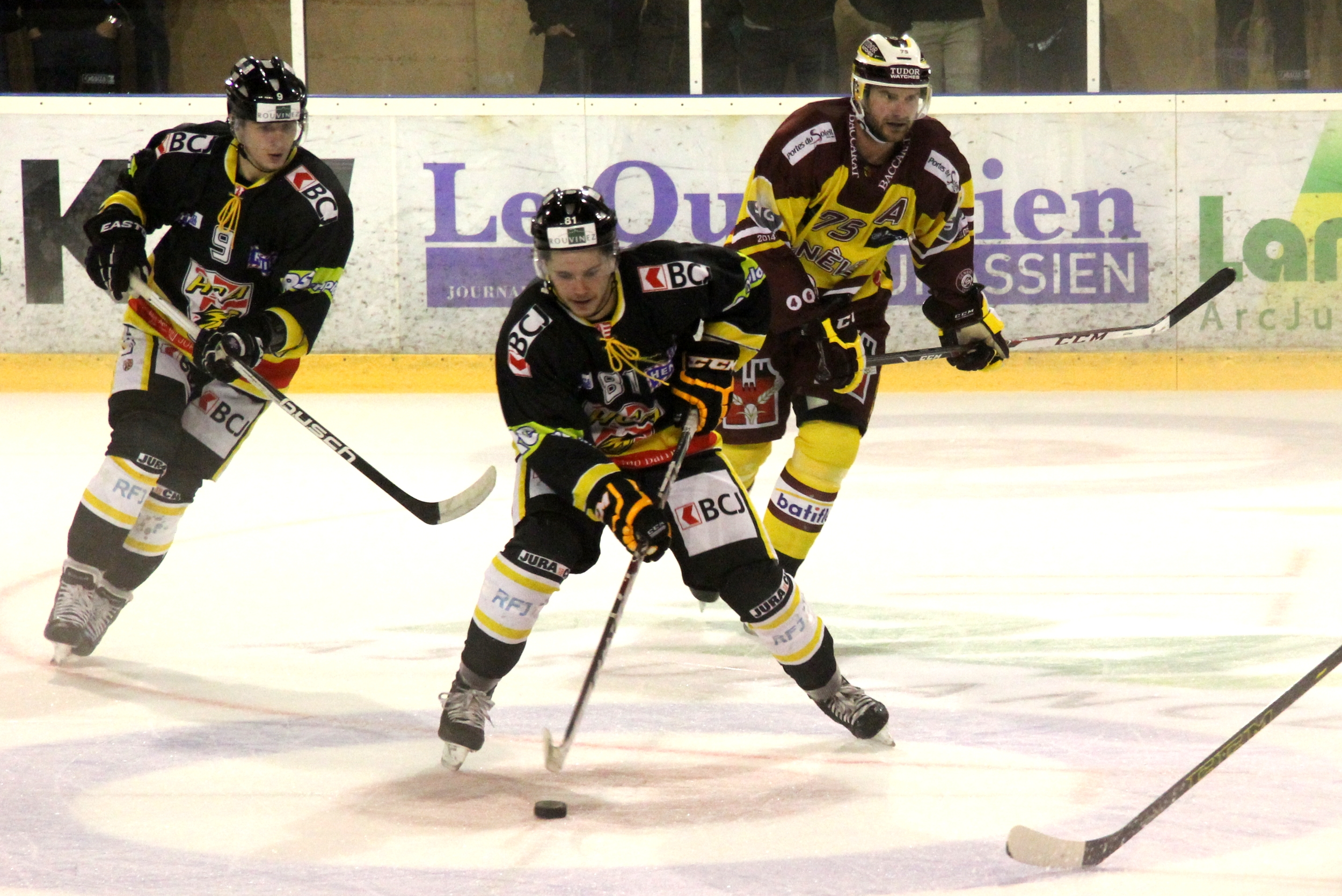 Stanislav Horanský (A 9), Jan Mosimann (A 81), Paul Ranger (G 75).